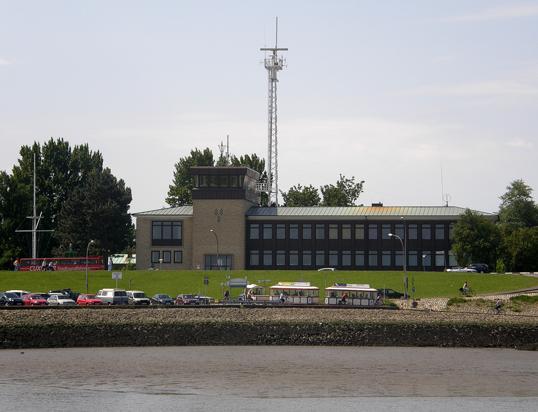 Bilder aus Cuxhaven